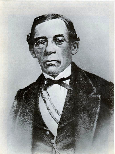 José Bernardo Alcedo (* 20. August 1788 in Lima; † 28. Dezember 1878 ebd.) war ein peruanischer Komponist.